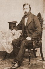 portret van Hendricus Nicolaus van Roijen (1831-1874), burgemeester van Ambt Hardenberg van 1860 tot 1874